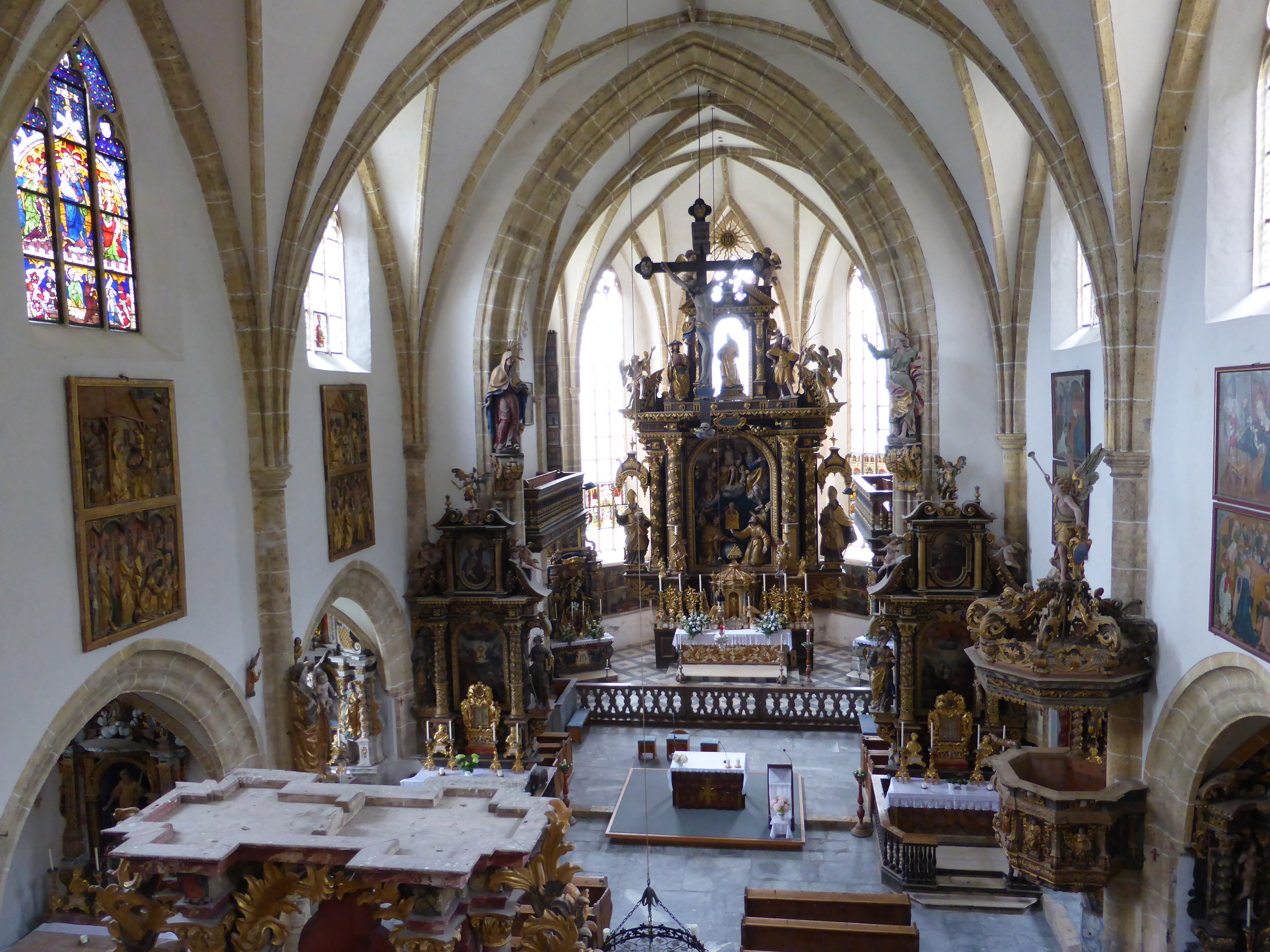 Innenraum St. Leonhard ob Tamsweg